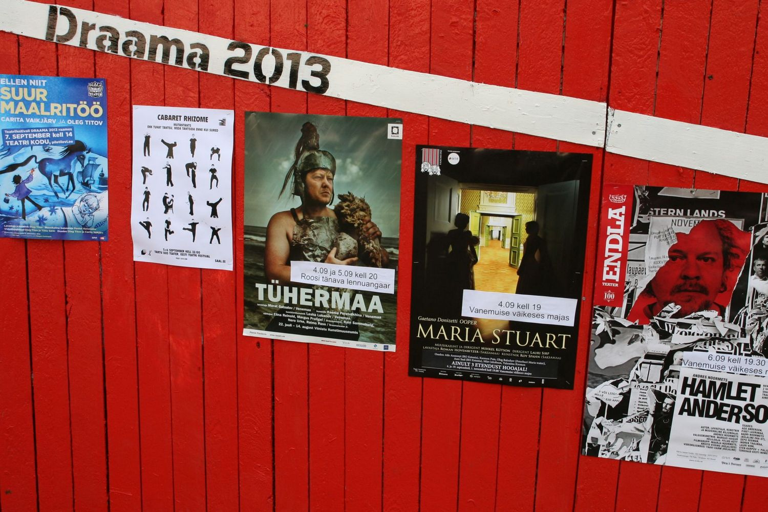 Draama Festivali kuulutused 2013.